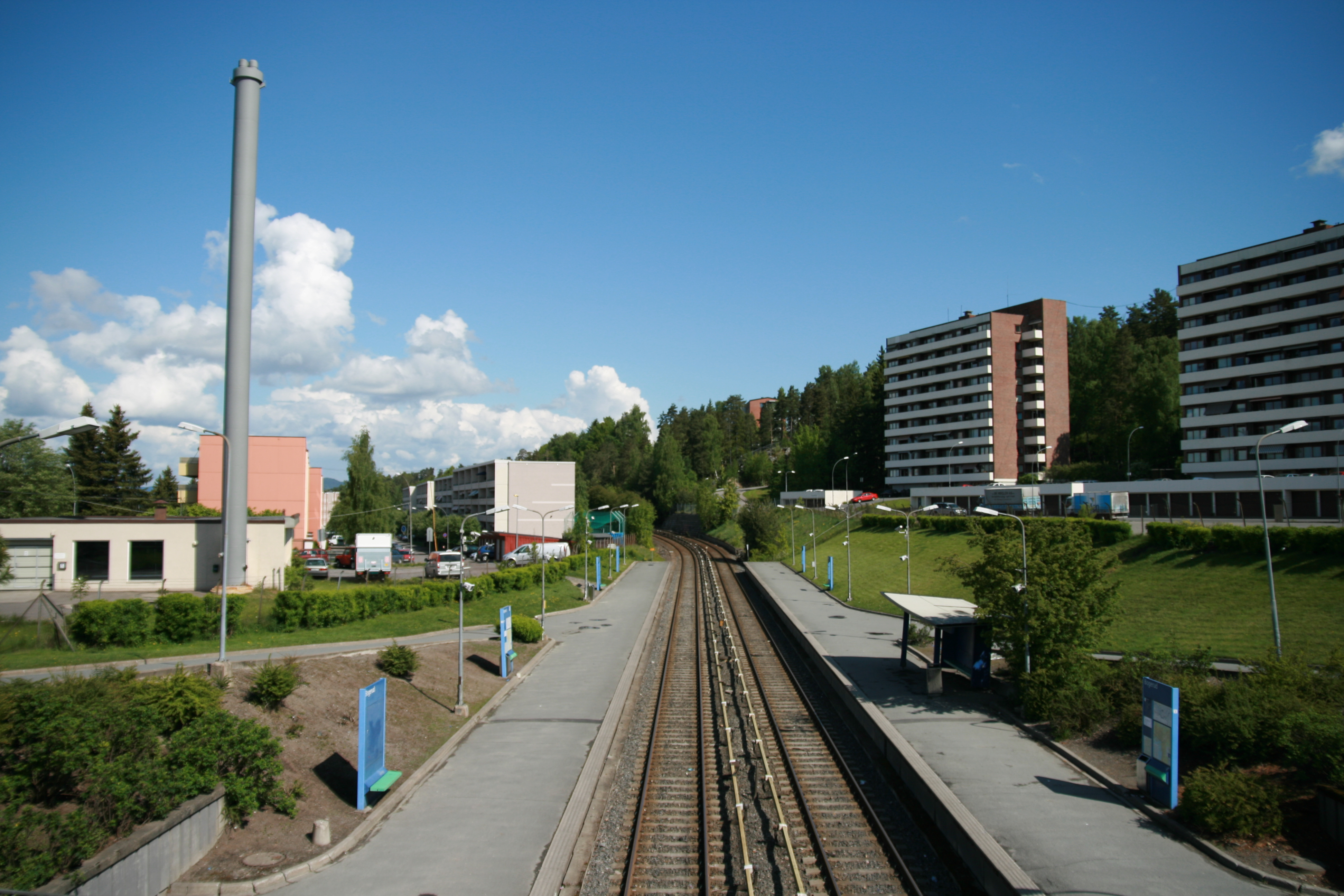 Bogerud T-bane, Oslo